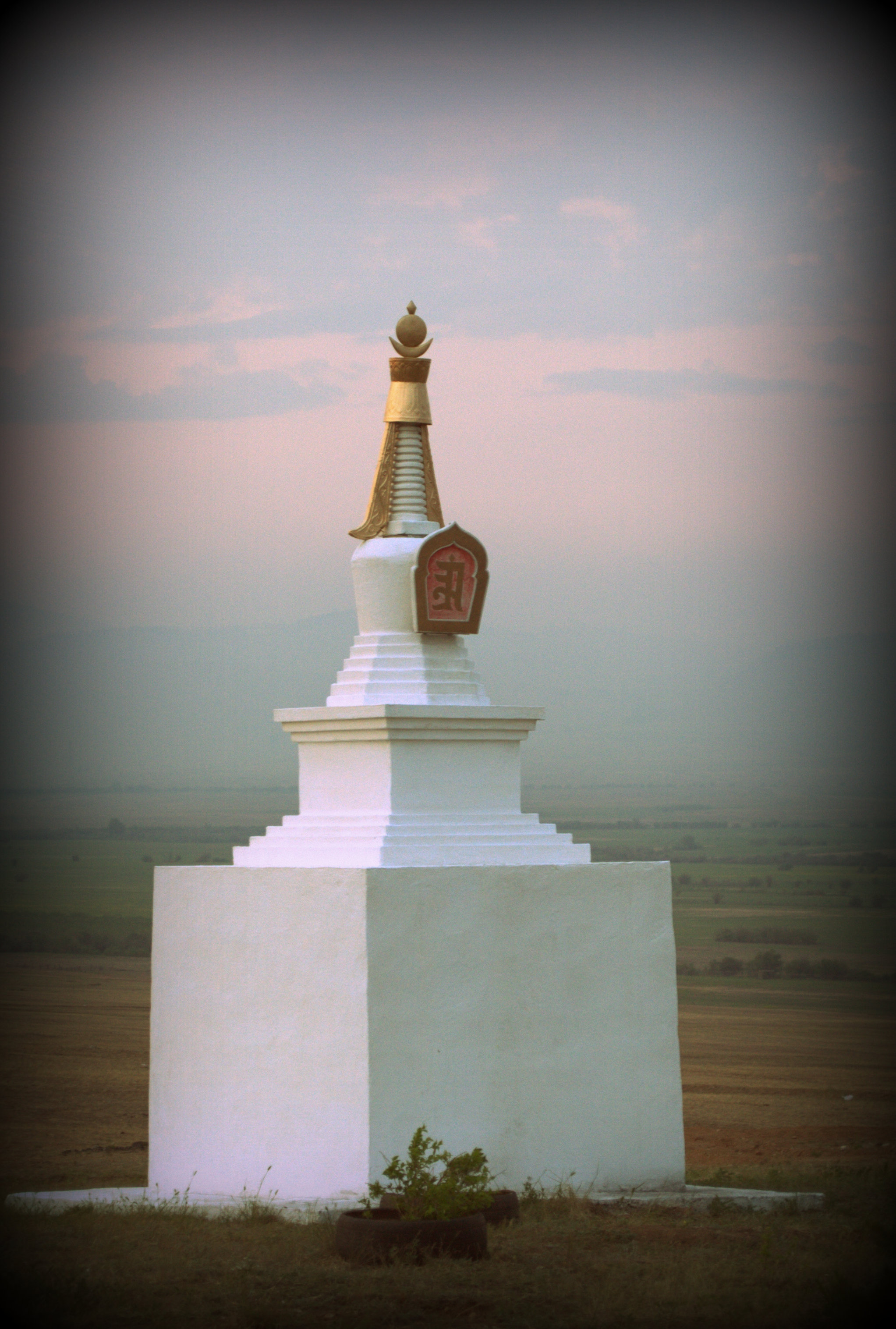 Ацагатский дацан. Заиграевский район, Бурятия, Сибирь